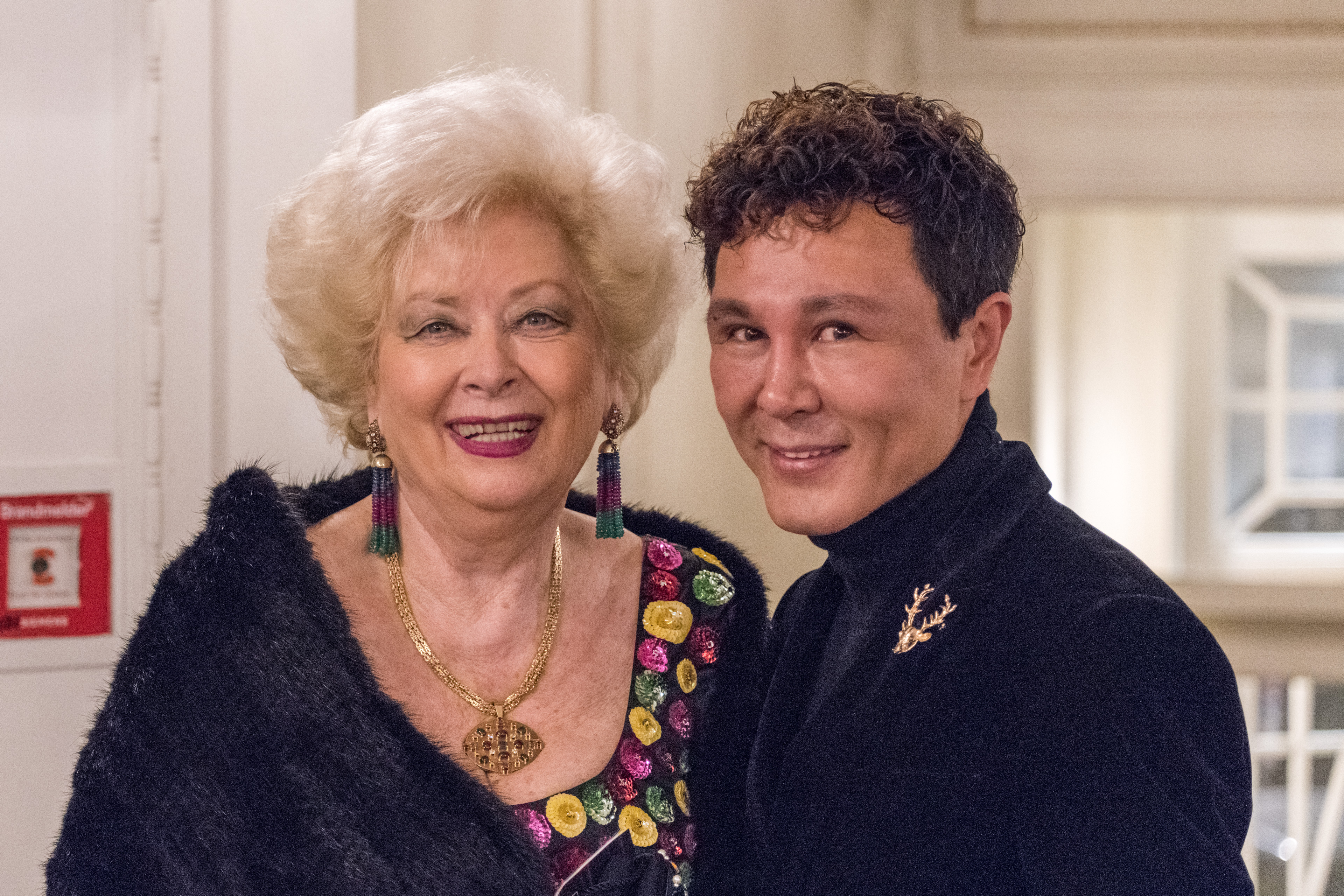 Birgit Sarata und Vincent Schirrmacher im Stadttheater Baden